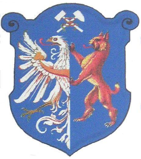 Znak města Kladna Původní podoba znaku s polovinou orlice (připomínající znak majitelů Kladna Žďárských ze Žďáru) a rysem (pravděpodobně symbol hojných lesů v okolí Kladna) byla ustanovena privilegiem Ferdinanda I. z 22. prosince cs:1561. Hornická kladiva do znaku přidal František Josef I. 5. srpna cs:1914. V 60. až 80. letech 20. století bývala nad kladiva umisťována červená pěticípá hvězda; tento doplněk však ani v oné době nebyl městu oficiálně schválen. Na rozdíl od většiny českých měst Kladno běžně užívá znak ne na prostém, ale zdobeném štítě, jaký byl v municipální heraldice užíván v době polepšení z roku 1914.